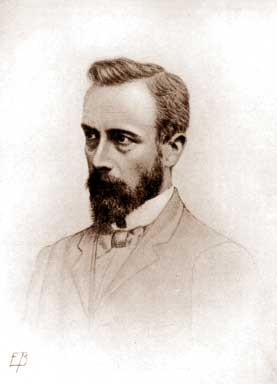 Prosper Van Langendonck (1862-1920), Vlaams dichter en schrijver.